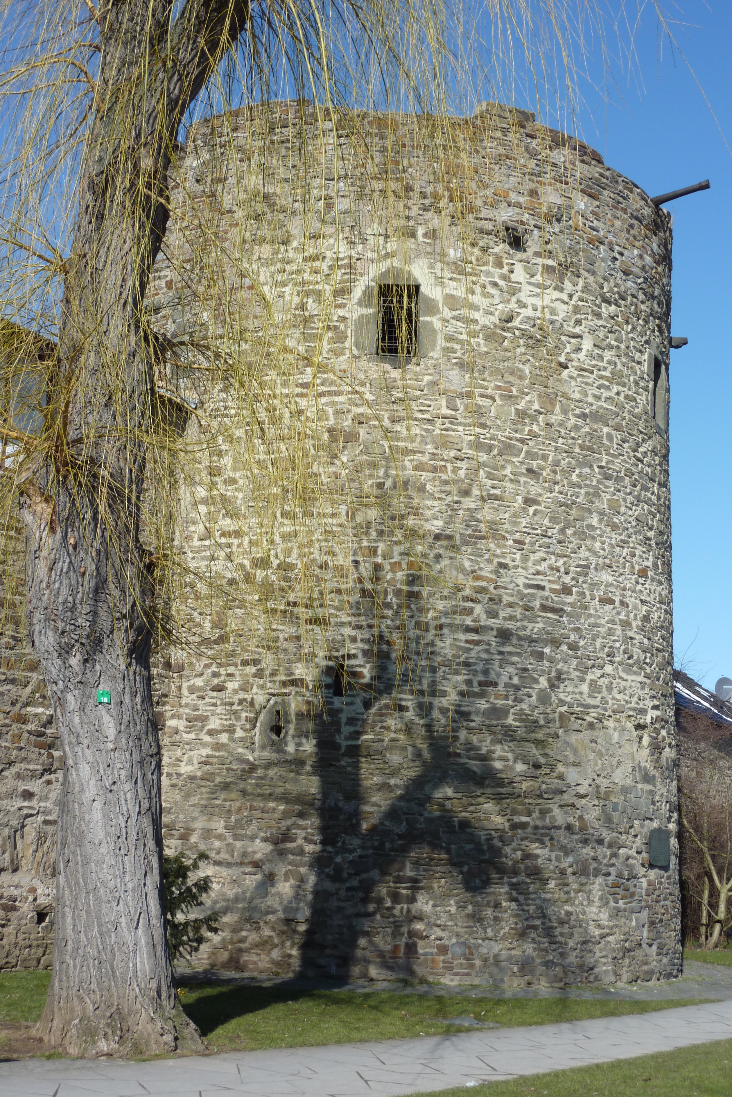 Stadtbefestigung (Ahrweiler), Kanonenturm